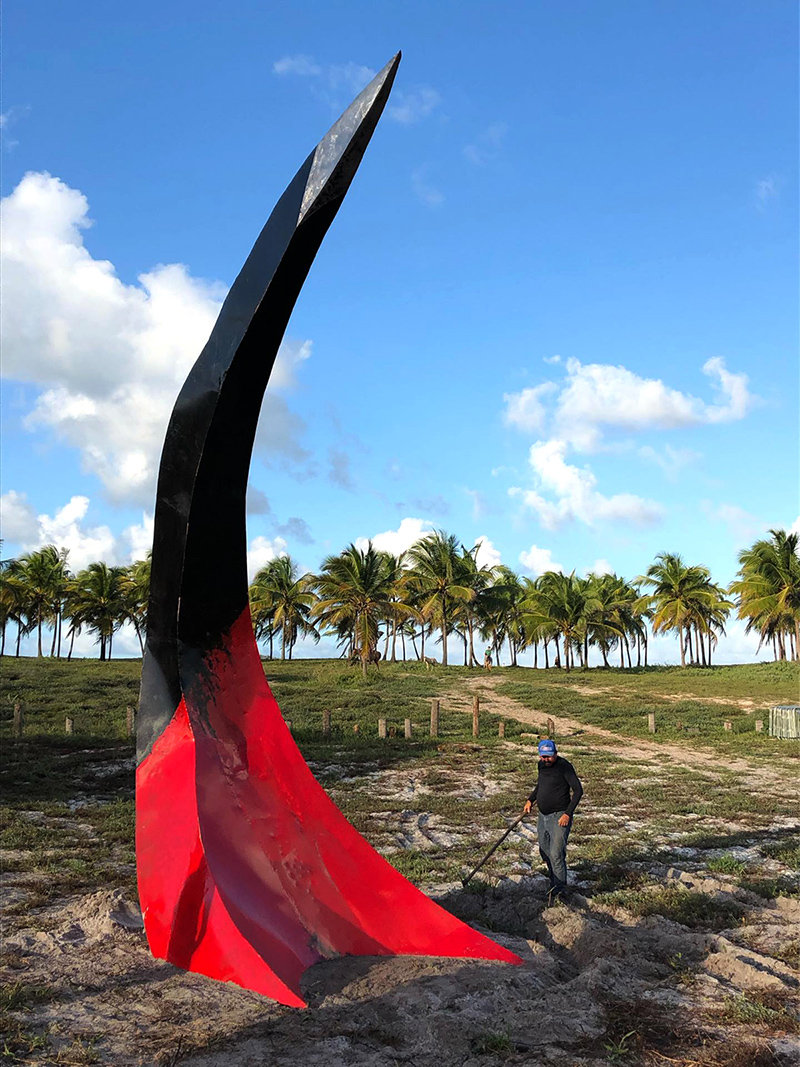 rzeźba